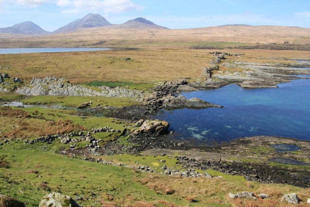 Wahrscheinlich: ein Trockendock der Wikinger, unterhalb der Festung An Dunan an der Lowlandman's Bay auf der insel Jura. Im Hintergrund die Paps of Jura